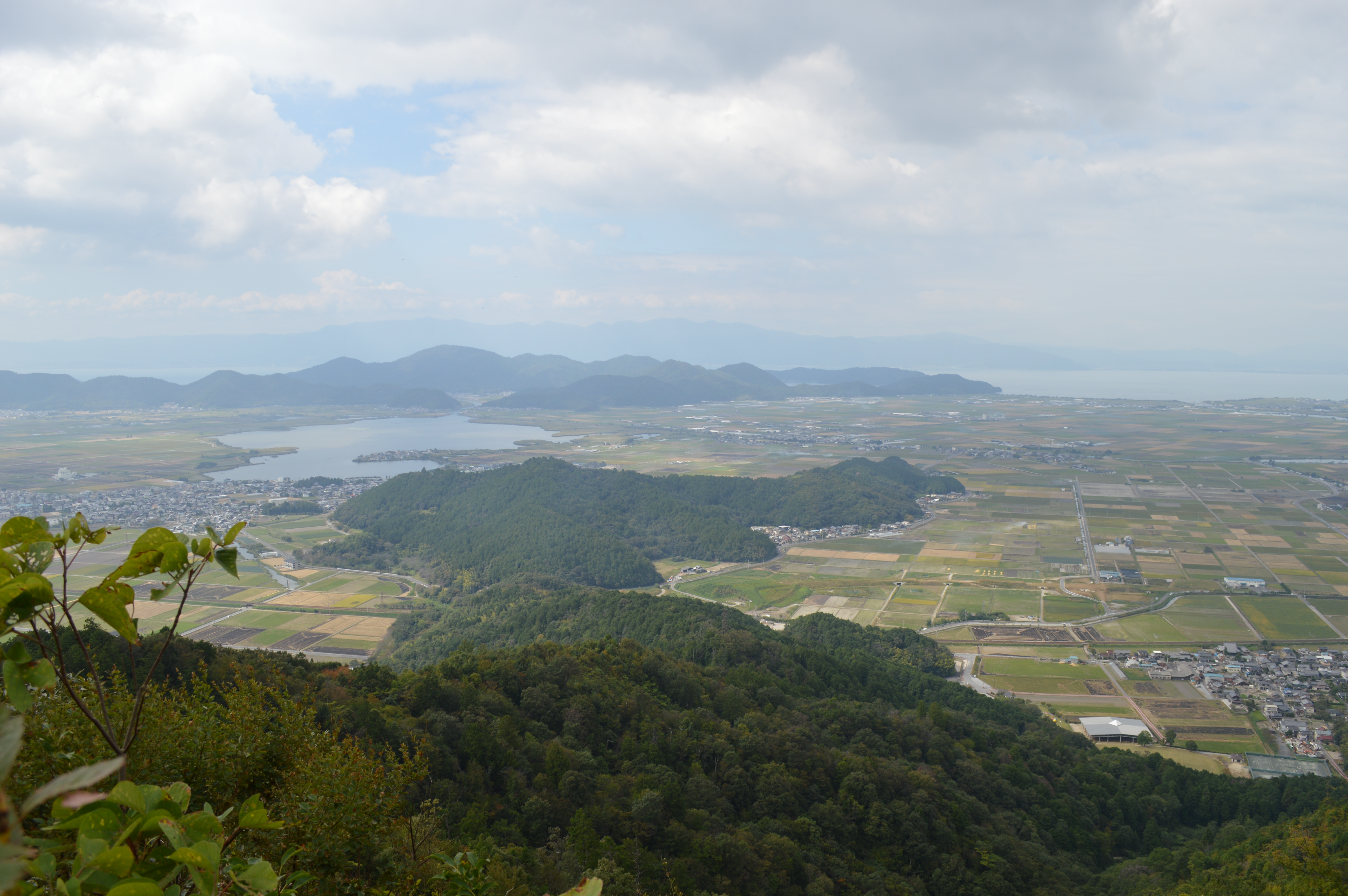 滋賀県近江八幡市の西の湖と大中湖干拓地、中央は安土山、繖山中腹より撮影